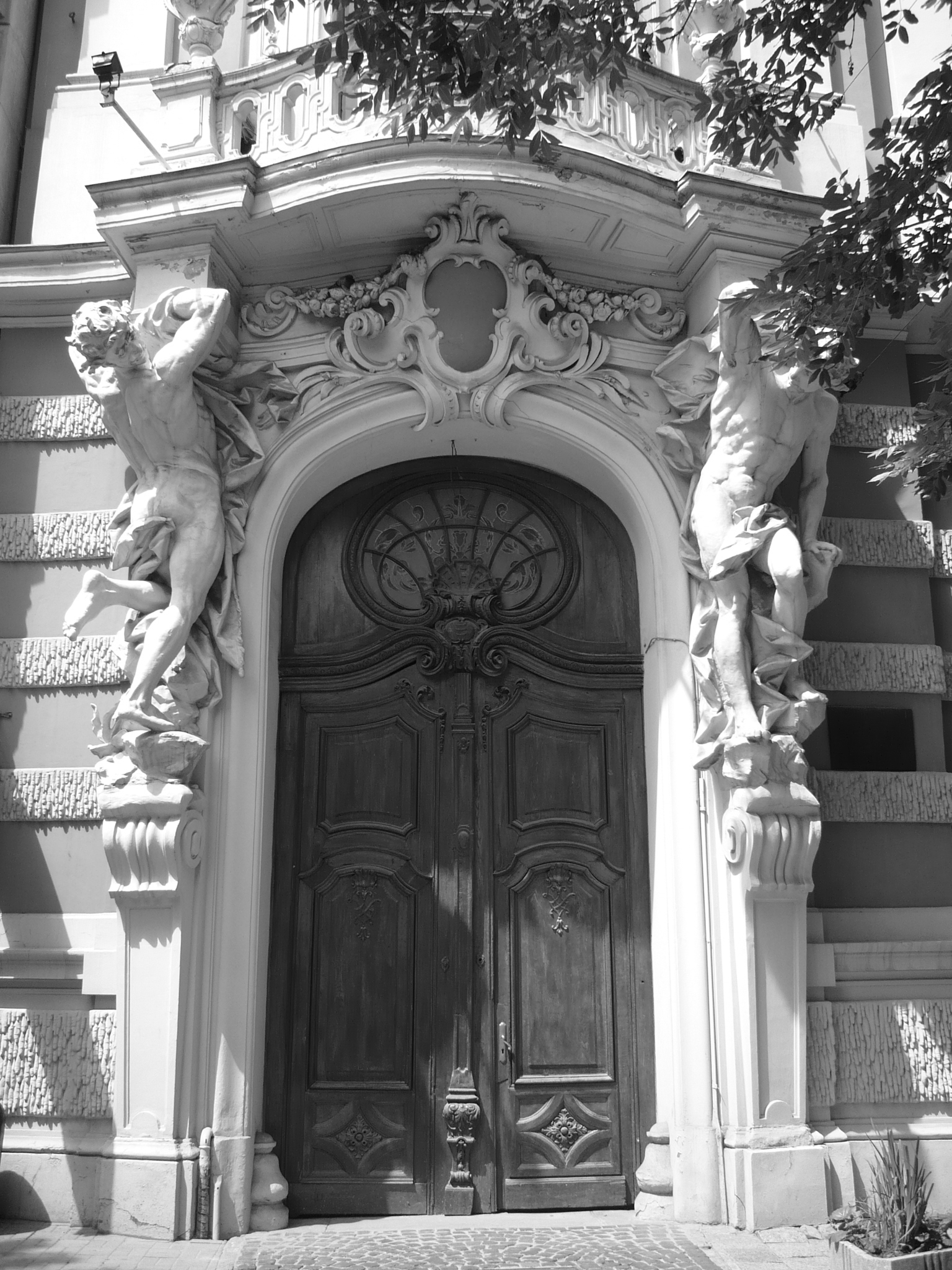 Lwów, ul. Czynu Listopadowego 6 - dawne Kasyno Szlacheckie, zwane także: Narodowym, Ziemiańskim, Końskim (zbud. 1897-98). Obecnie Dom Uczonych